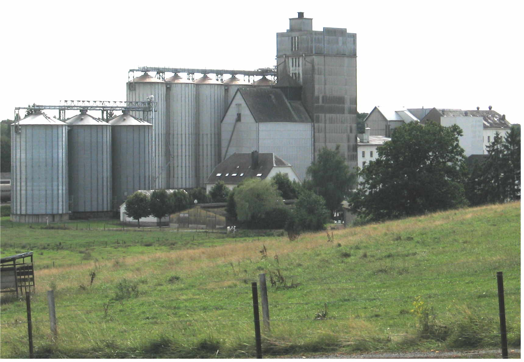 D'Mille vu Klengbetten